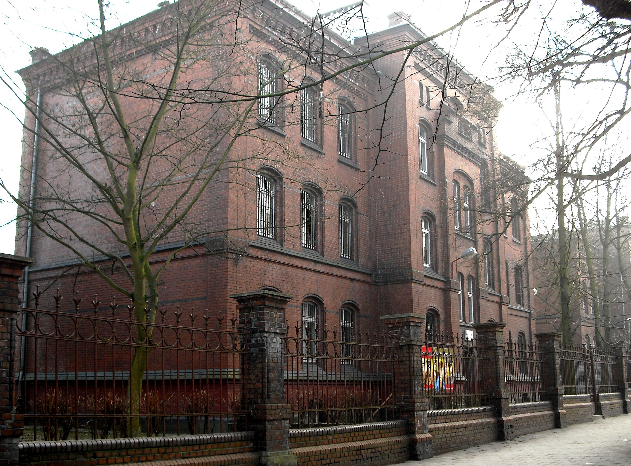 WKU w Szczecinie